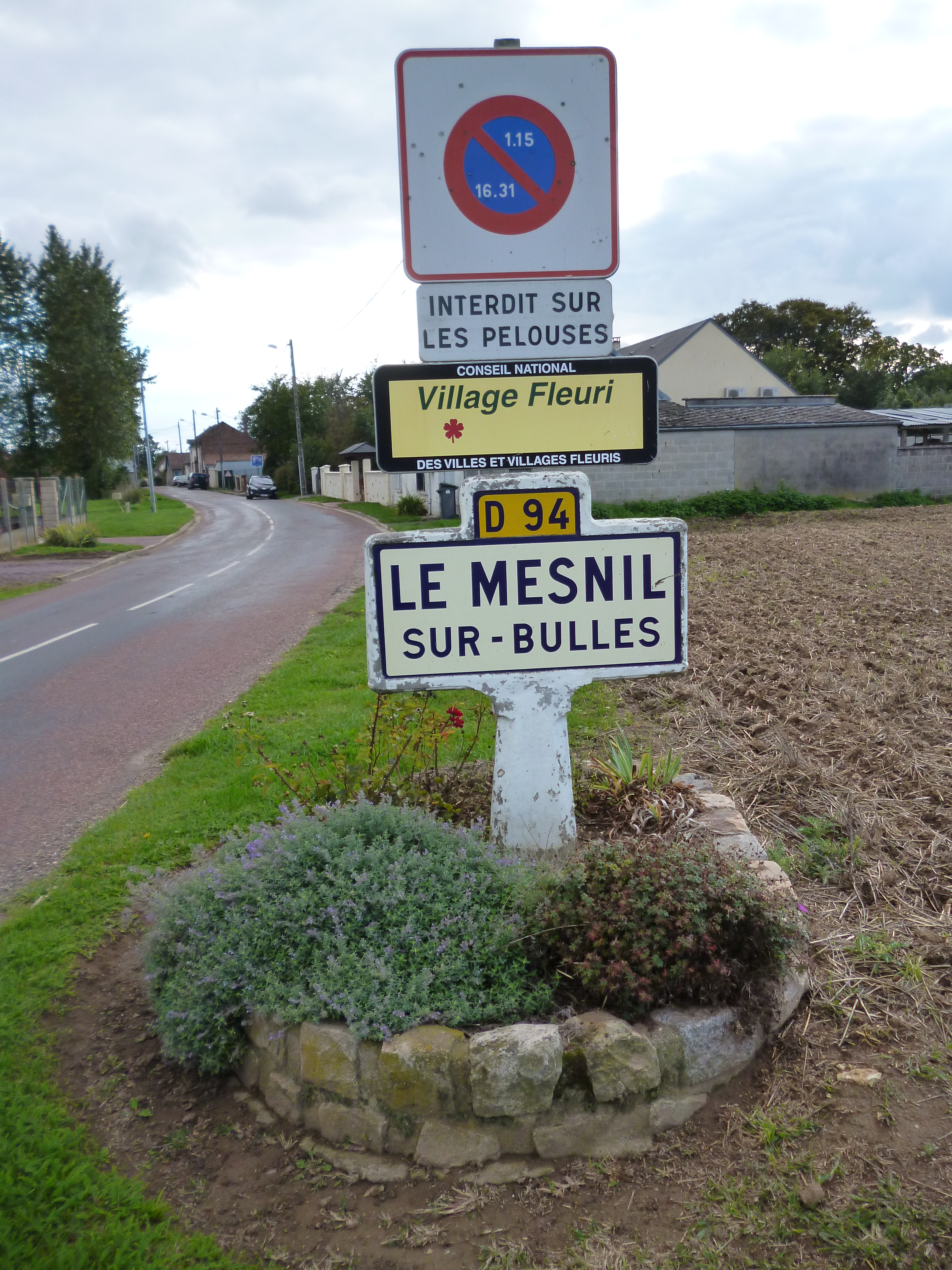 Panneau de signalisation routière dans la commune du Mesnil-sur-Bulles (Oise).